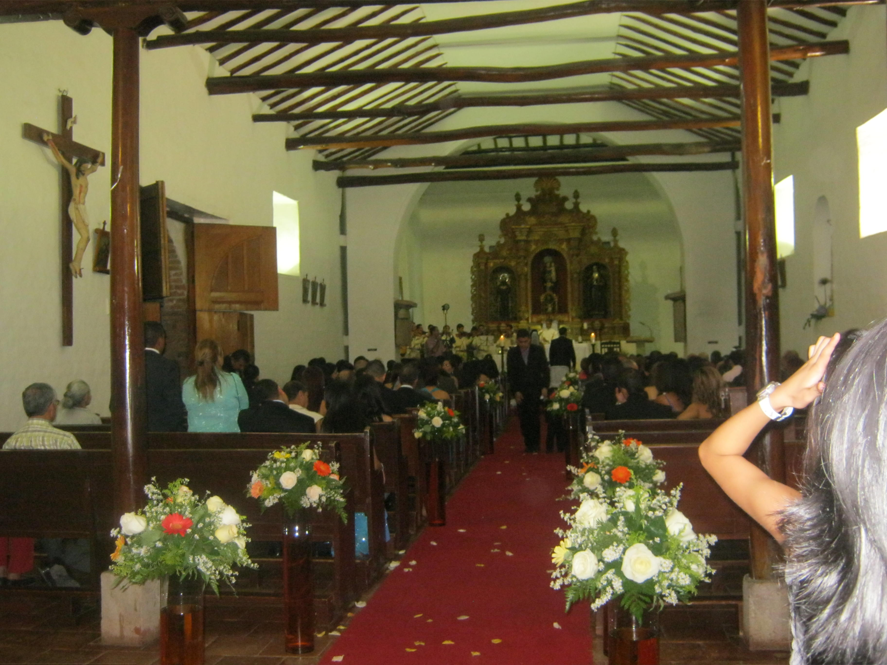 Interior de la Iglesia de San Antonio en CaliEsperanto: Eno de la Preĝejo de Sanktulo Antonio en Kalio